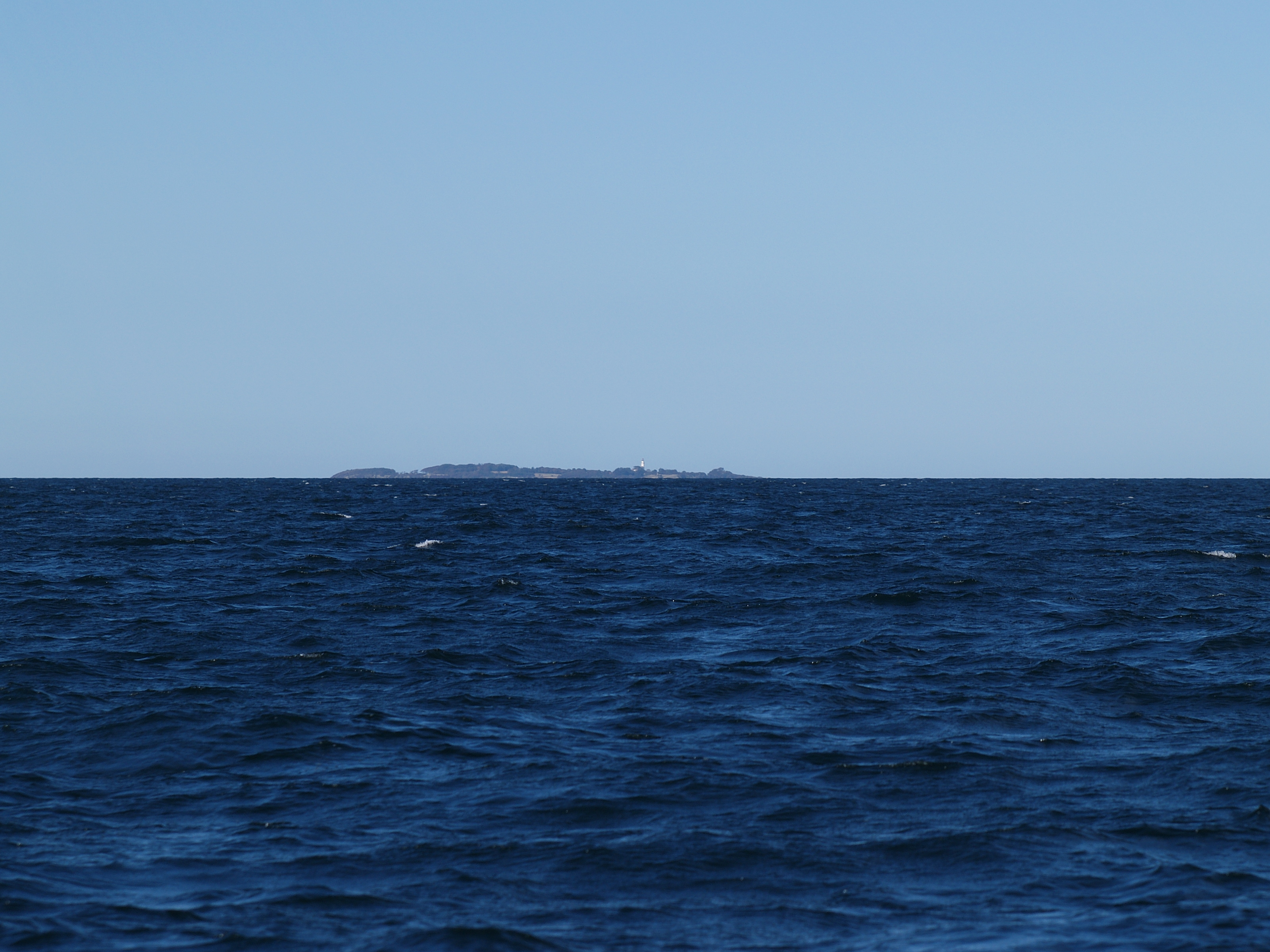 Dänische Insel Hesselø im Kattegat, aus südlicher Richtung gesehen, mit Leuchtturm Hesselø